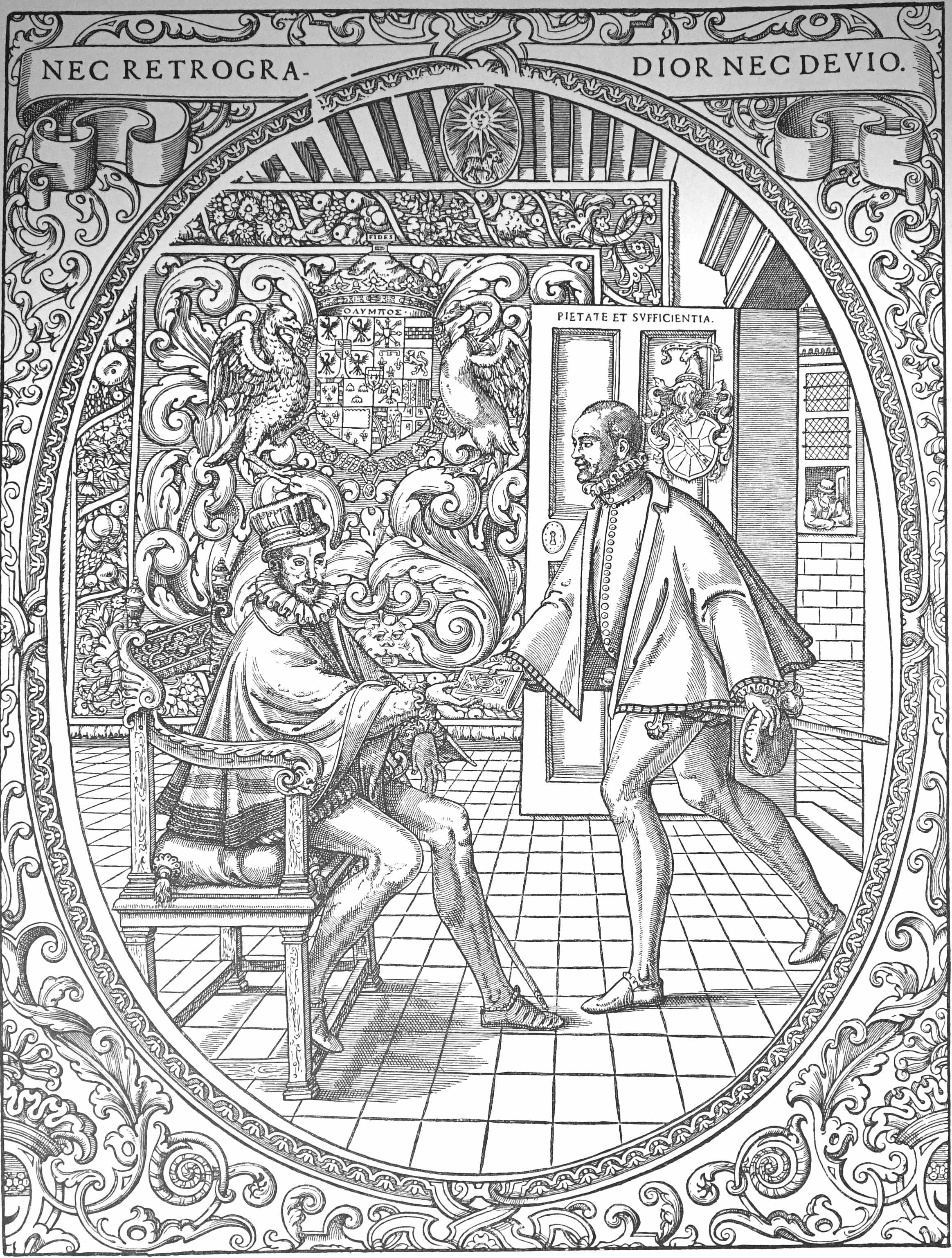 issue de la bibliothèque de reims, microfilm 94 - 20. texte sur la gravure : Paris 1587 atelier des frères de GOurmont tableau des arts libéraux l'auteur offrant son livre au duc de Nevers.